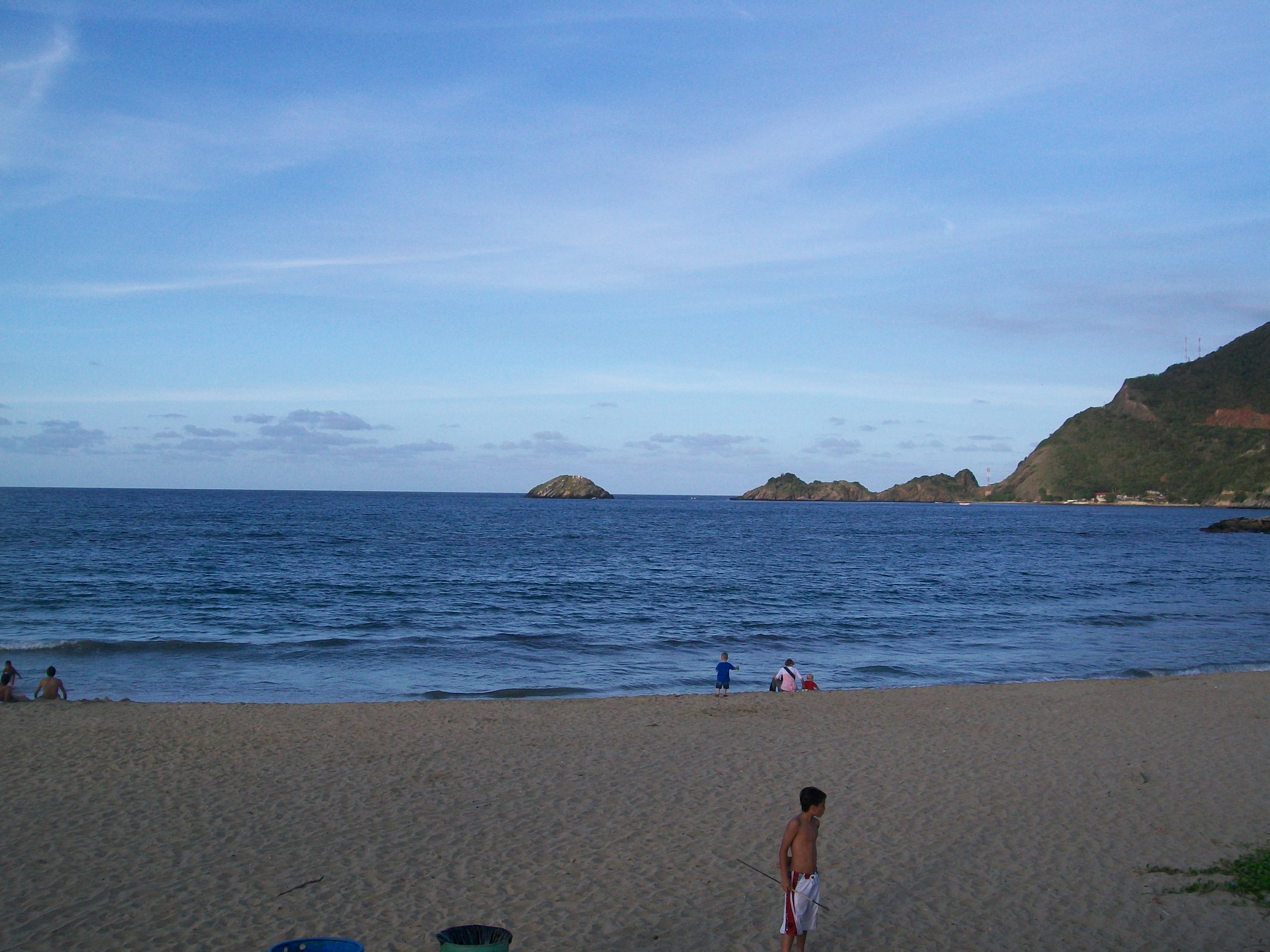 Bahía El Playón, Ocumare de la Costa, Venezuela